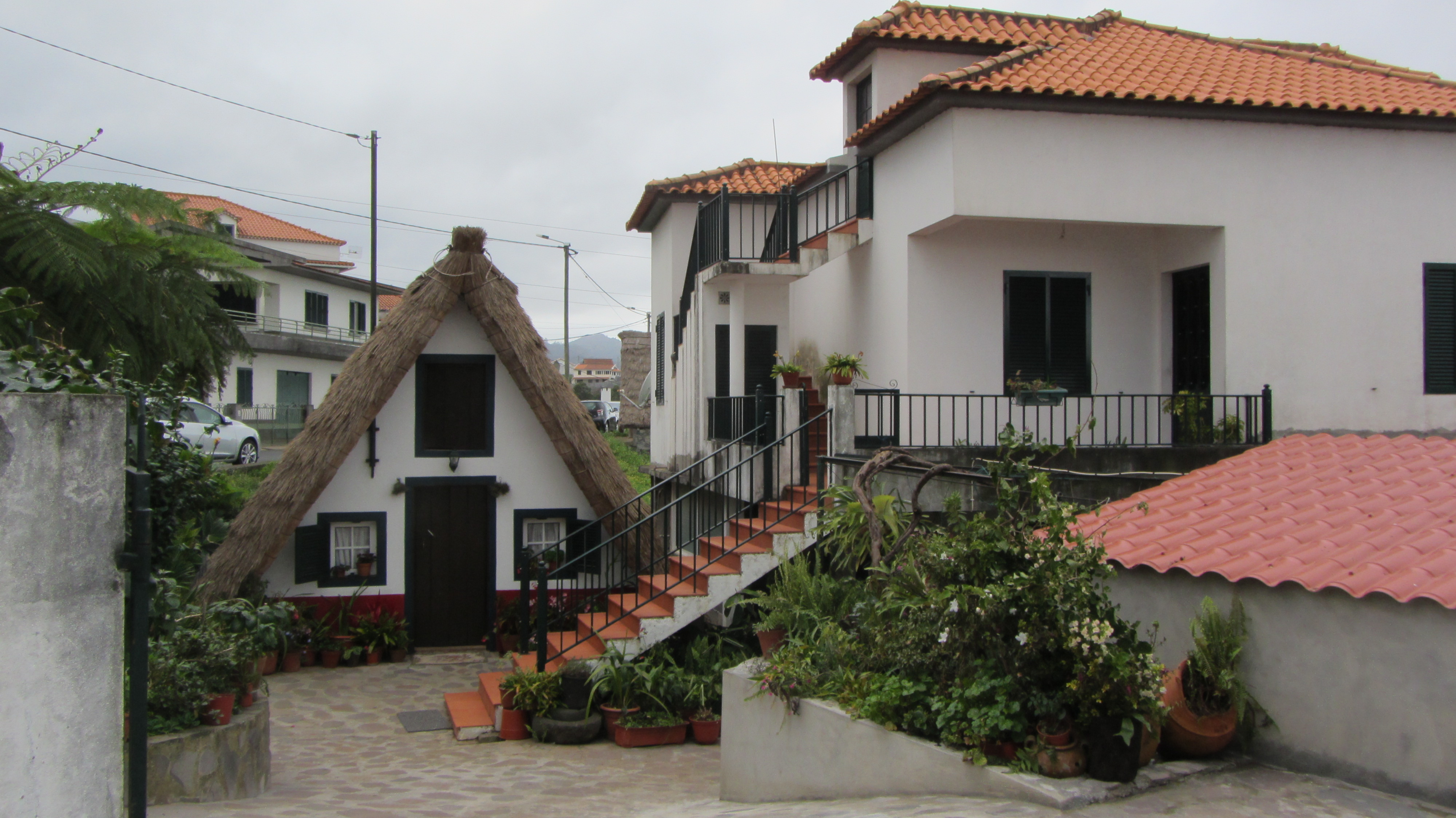 Santana, Madeira